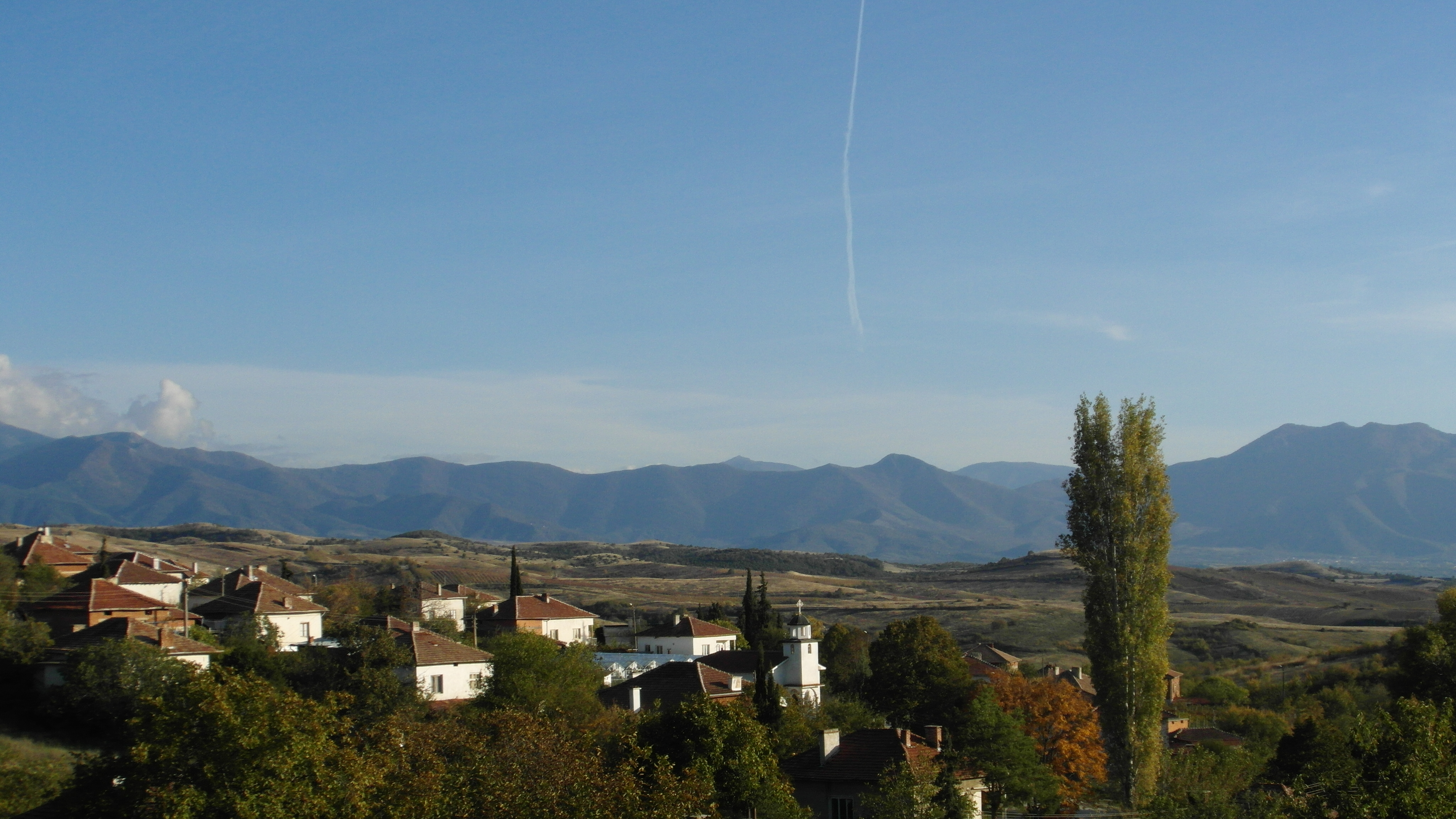 Лозеница